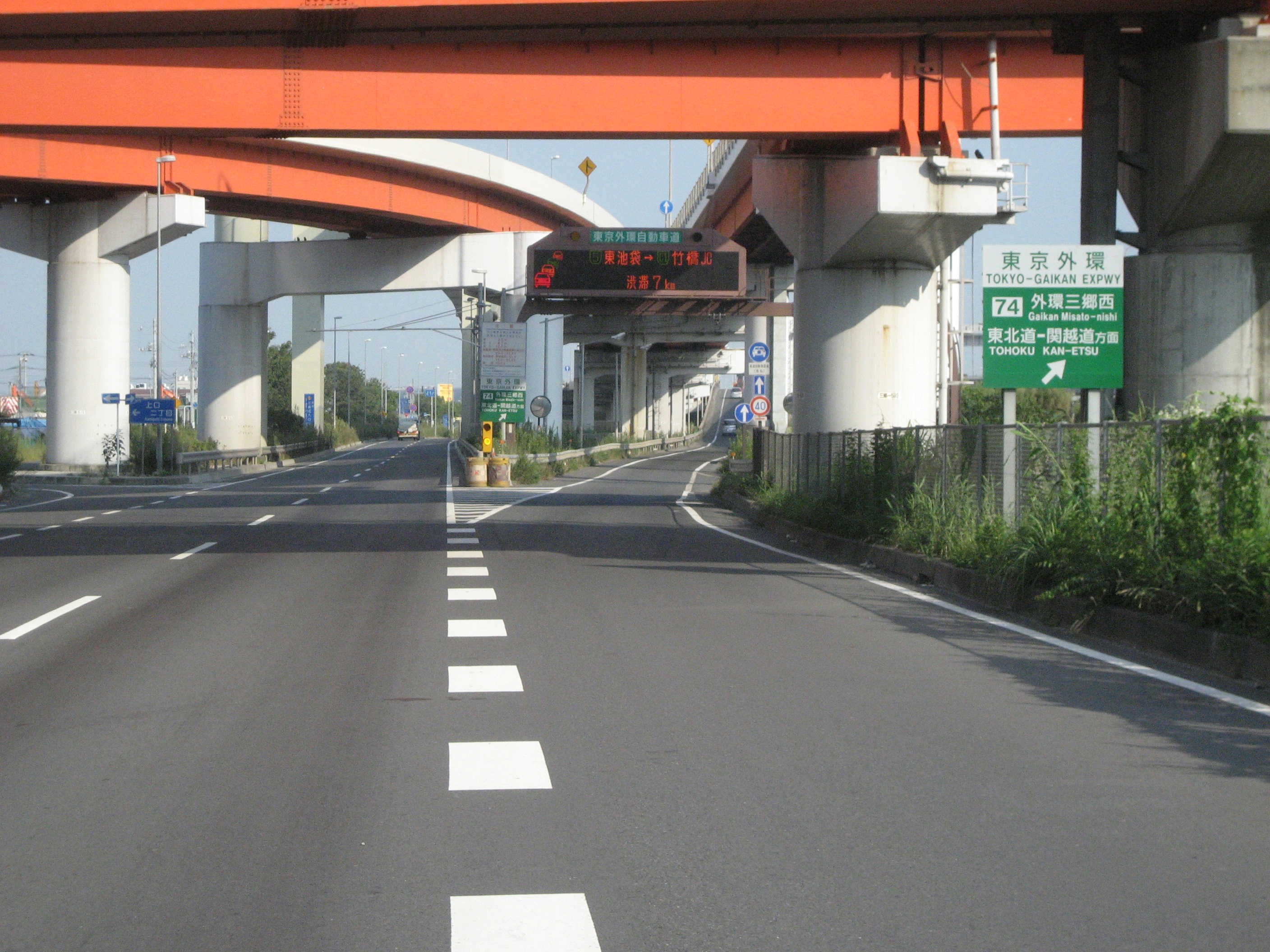 三郷西インター国道298号線草加方面側入り口